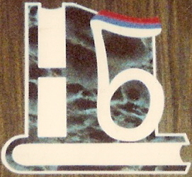 Logo JU NBG